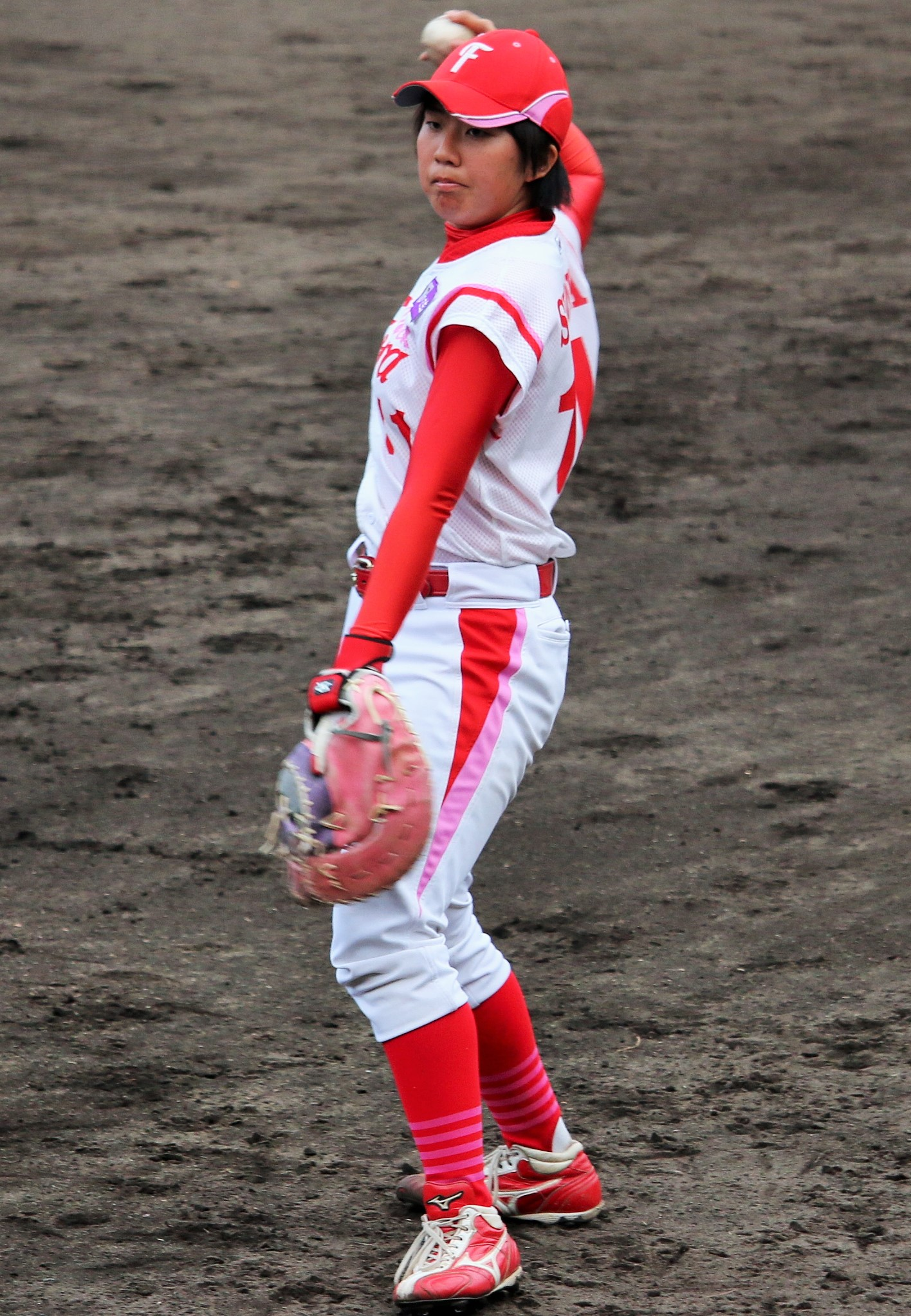 ウエスト・フローラ投手の塩谷千晶。わかさスタジアム京都にて。